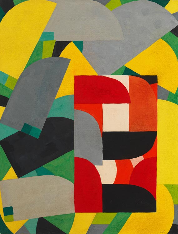 Otto Freundlich Komposition 1938Objektbeschreibung im Auktionskatalog bei Ketterer:Gouache Rechts unten monogrammiert. Verso datiert "18 IX 1938 Paris". Auf hellgrauem Karton. 32 x 25 cm (12,5 x 9,8 in), Blattgröße